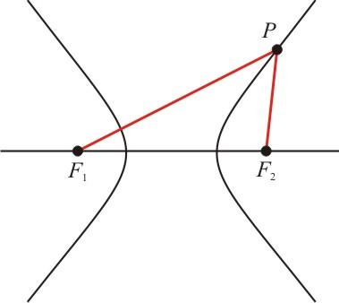 hiperbole origem